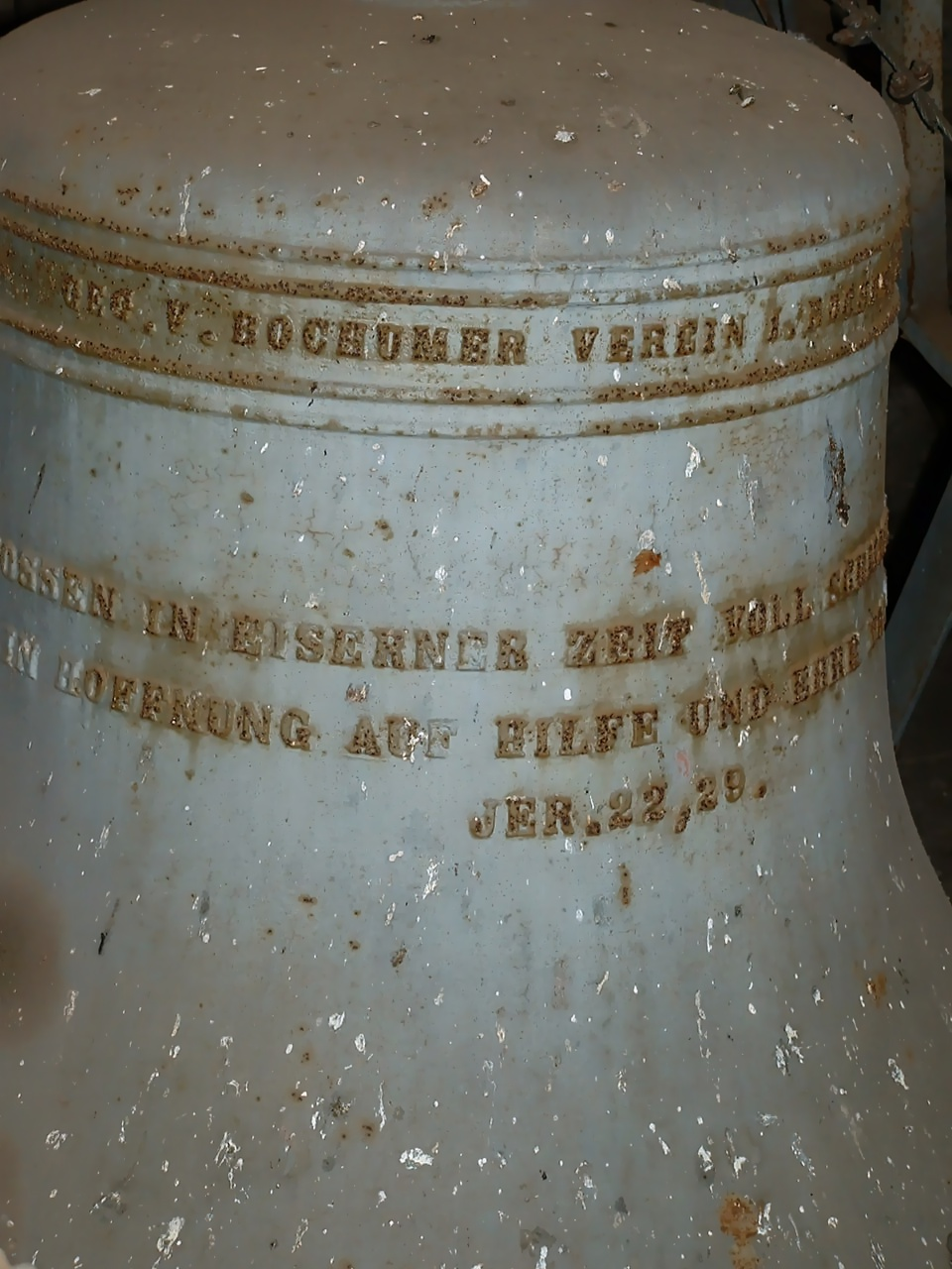 Evangelische Kirche Rhaunen, Glockeb